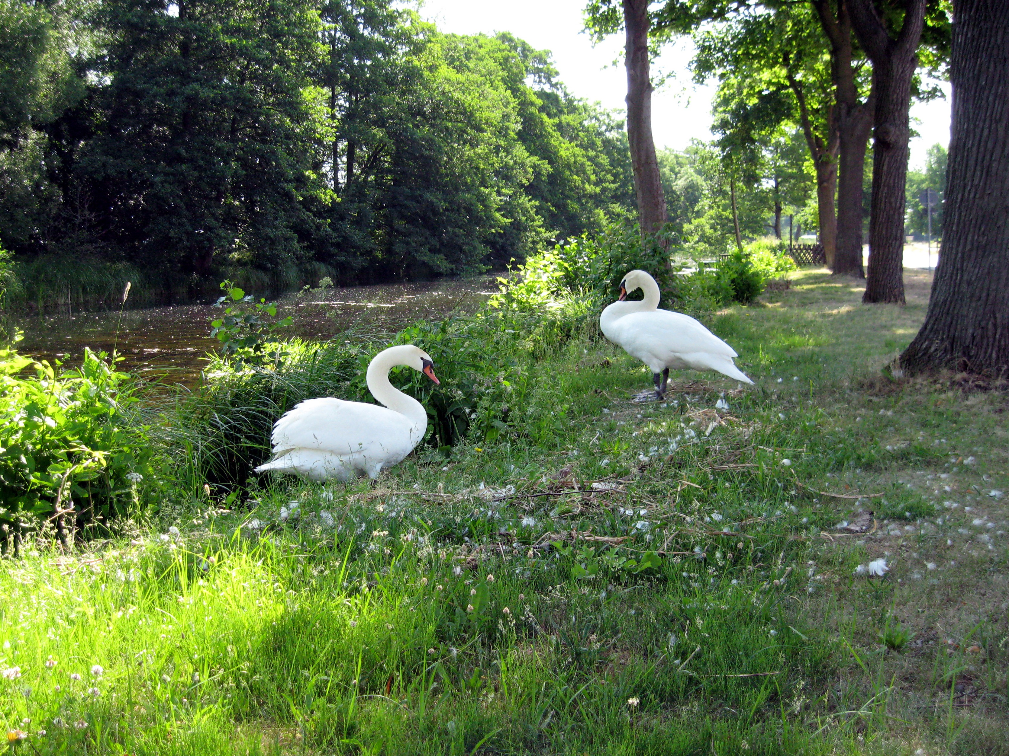 Schwäne am Langen Trödel in Zerpenschleuse, Gemeinde Wandlitz, Landkreis Barnim, Land Brandenburg, Deutschland